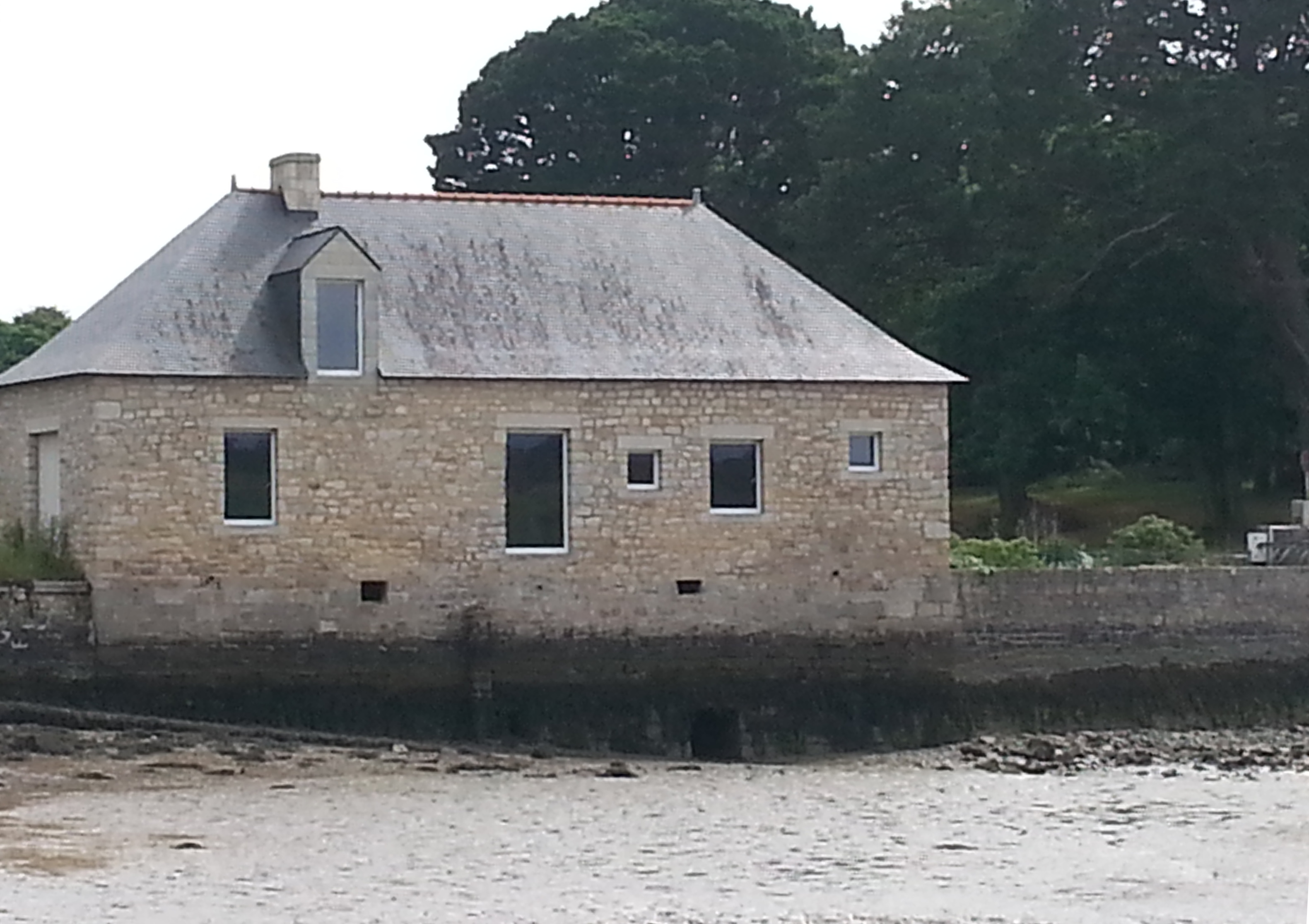 Moulin à marée du Lindin